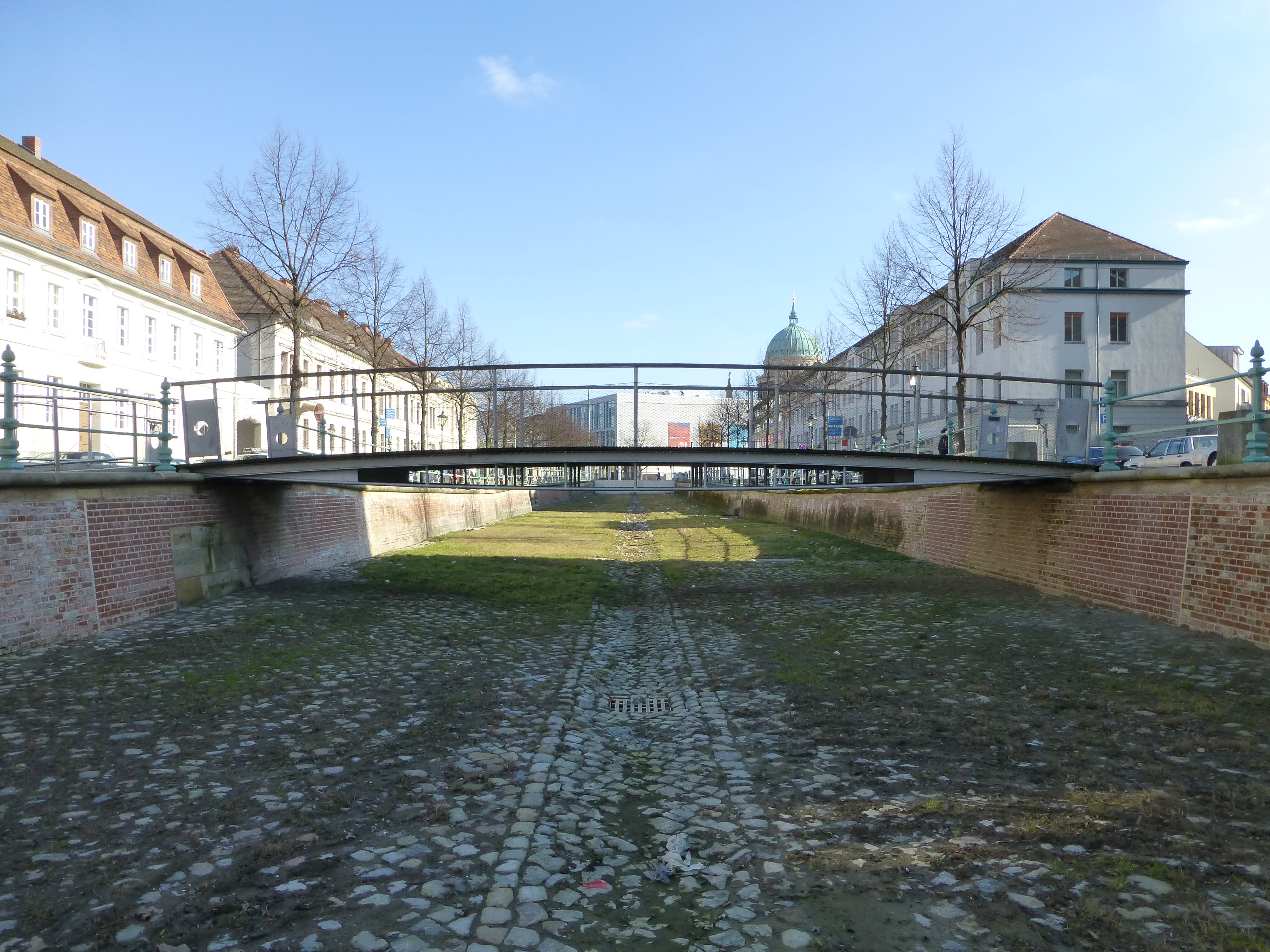 Der Ladenbergsteg über den Potsdamer Stadtkanal an seiner endgültigen Position.